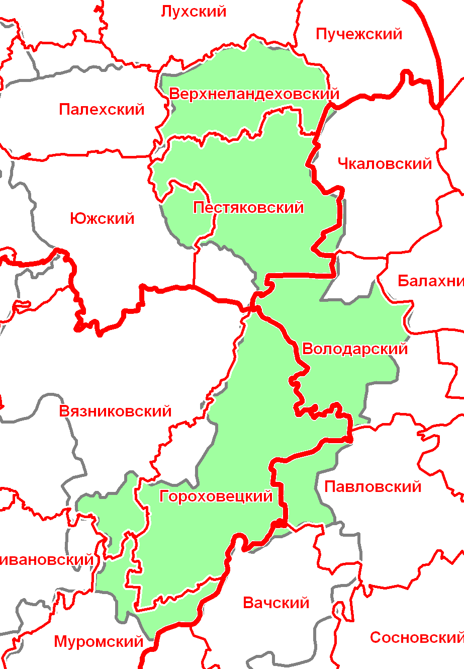 Гороховецкий уезд в современной сетке районов.